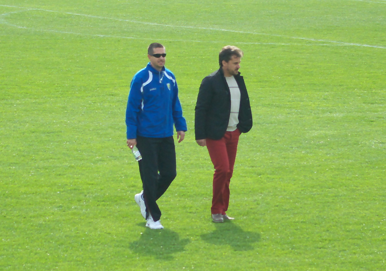 Stal Sanok - Karpaty Krosno 0:2 (05.04.2014). Trenerzy Piotr Kot i Robert Ząbkiewicz